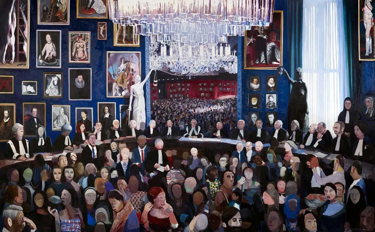 Hoge Raad (2015, olieverf op doek, 400 x 647 cm) Het monumentale Hoge Raad van Helen Verhoeven (1974) zal niemand ontgaan in de ontvangstruimte van de grote zittingszaal mr. L.E. Visser. In de haar kenmerkende stijl, waarin personen, patronen en vlakken haast opgeknipt samenkomen, schilderde Verhoeven met behulp van een hoogwerker letterlijk en figuurlijk een indrukwekkend doek. Een onderzoekende voorstelling die oogt als een rijkelijk bestikte lappendeken vol gelaagde verwijzingen naar goed (recht) en kwaad (onrecht). Op de voorgrond is een gemêleerd gezelschap afgebeeld van anonieme individuen (soms zelfs gezichtloos) die nauwelijks onderling contact hebben; de wit-rode snotsliert die als een absurdistische navelstreng tussen twee neuzen hangt daargelaten. Achter het gezelschap zit een groep rechters aan een lange tafel. Wederom anonieme figuren, op één na in het midden van de tafel. Mr. Visser, de Joodse president van de Hoge Raad die tijdens de bezetting door de Nazi’s zonder protest van zijn collega’s werd afgezet. Het enorme beeld van Vrouwe Justitia achter de rechters krijgt in deze context een prikkelende betekenis, mede omdat zij wordt geflankeerd door de bijbelse Joodse Judith met het hoofd van Holofernes in haar hand. Uitdagend zijn ook andere kunsthistorische beeldcitaten - zoals het gruwelijke lot van de gebroeders De Witt en Picasso’s Guernica - waarin recht en onrecht gelijk aan de realiteit complexe en door elkaar heen lopende begrippen blijken.